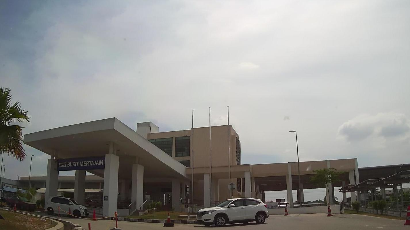 KTM Bukit Mertajam